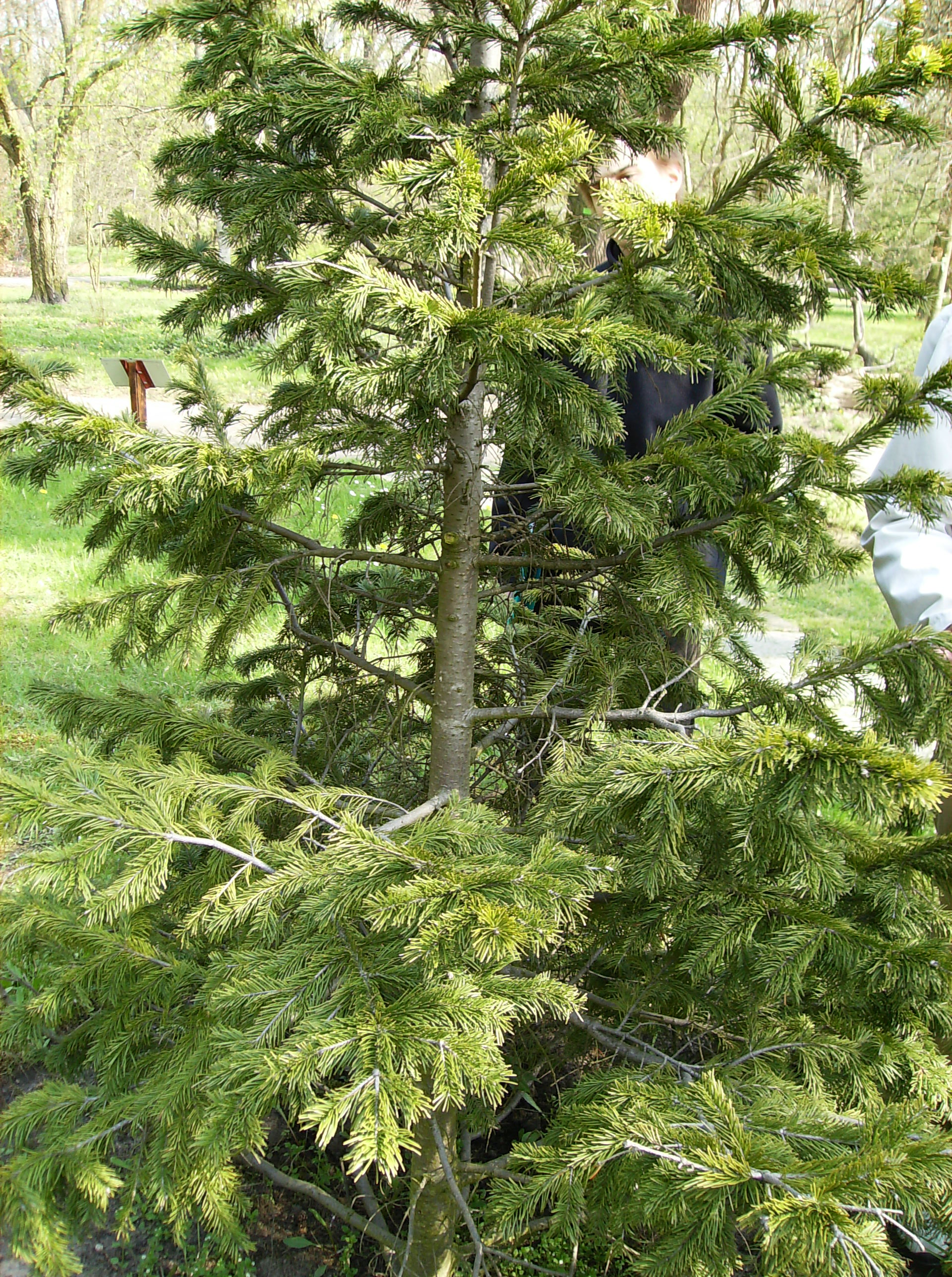 Abies sibirica